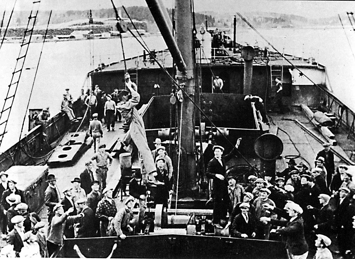 Ådalshändelserna. Strejkbrytare på fartyget Milos, Sandviken.